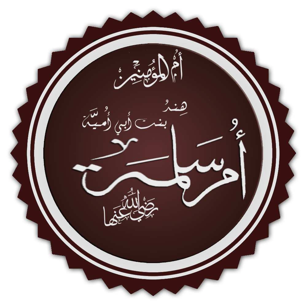 تخطيط اسم أم سلمة أم المؤمنين هند بنت أبي أمية رضي الله عنها